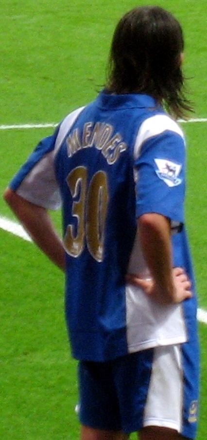 Pedro Mendes